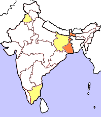 Lok Sabha 1999. Gjord av Soman.